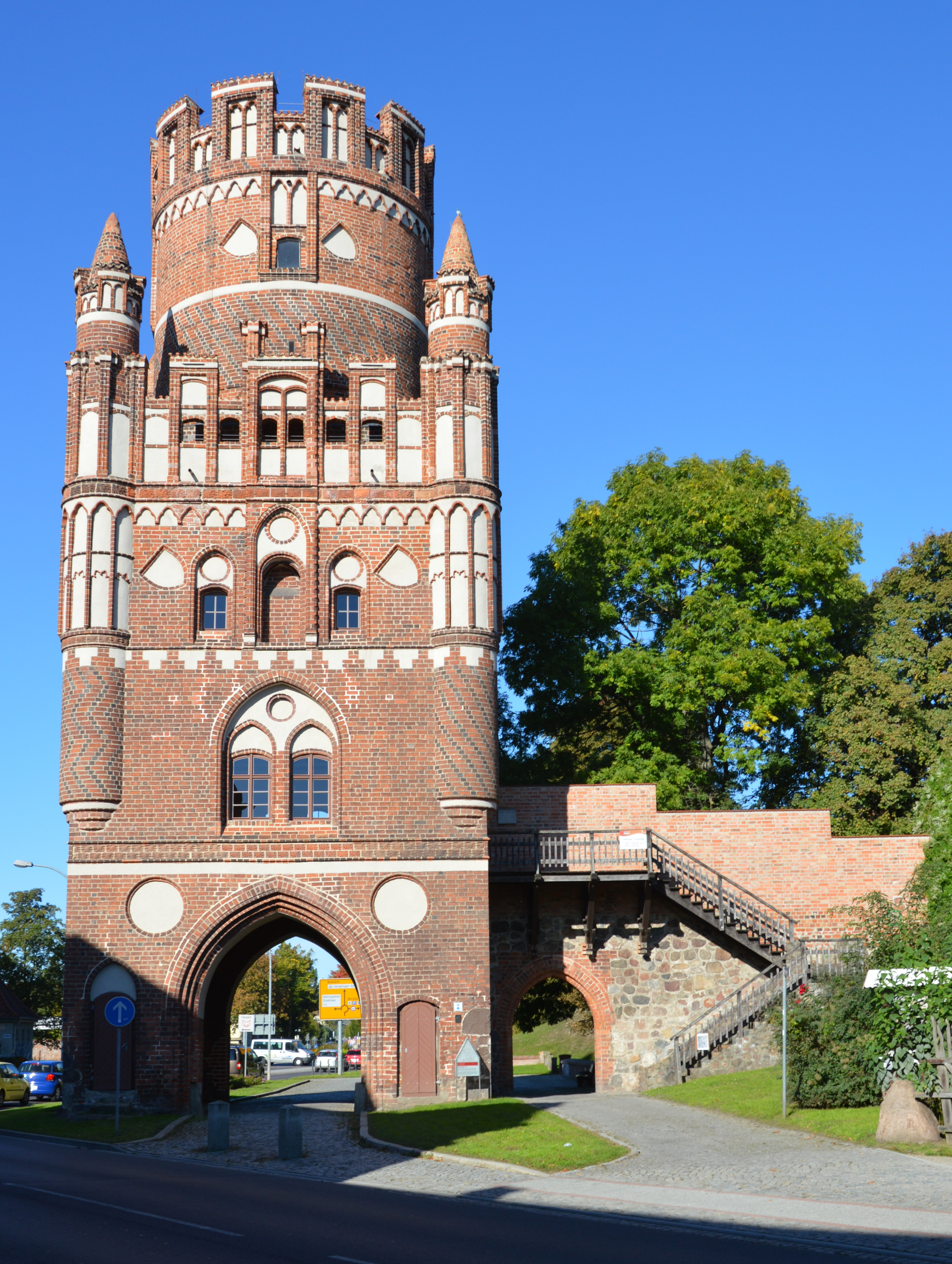 Uenglinger Tor Stendal